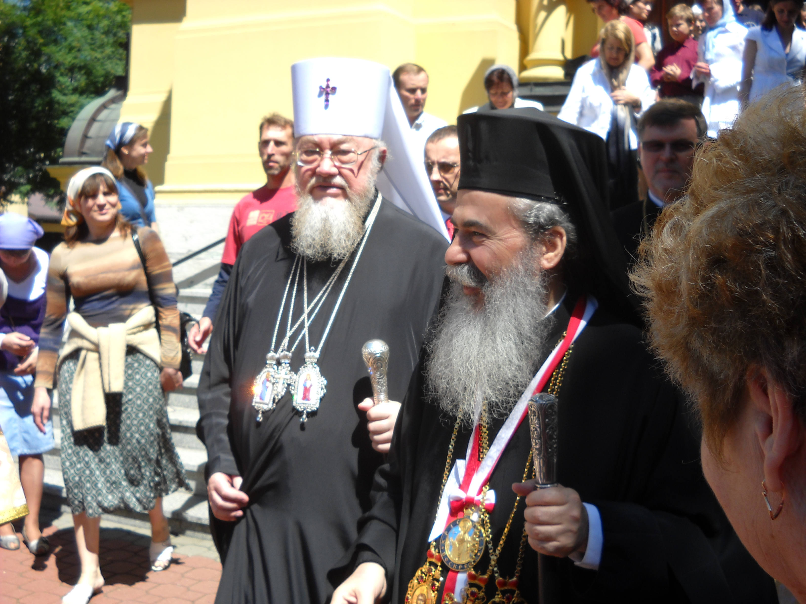 Patriarcha jerozolimski Teofil i metropolita warszawski i całej Polski Sawa; Warszawa, 27 czerwca 2010